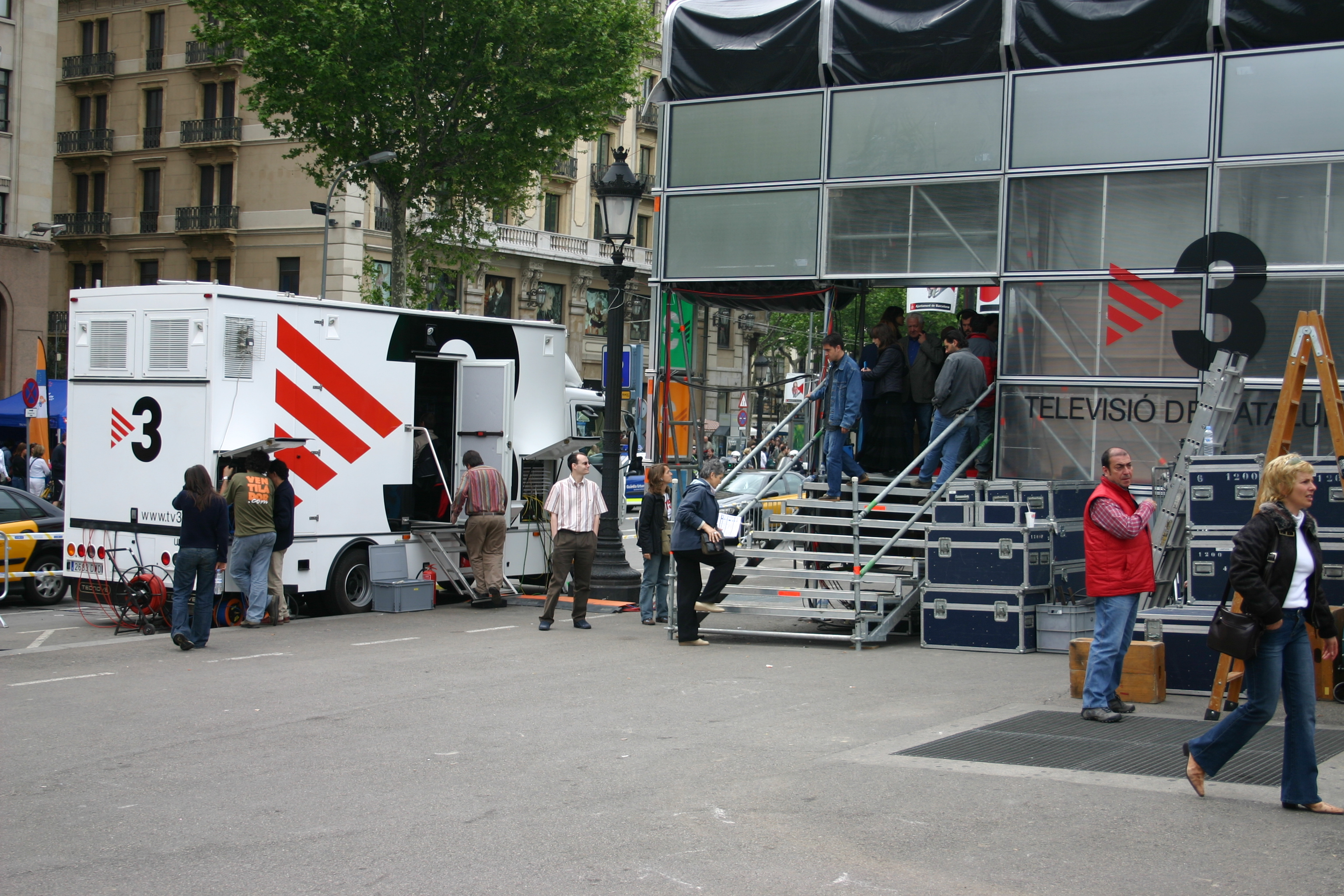 Diada de Sant Jordi. Instalación de TV3 en Plaza Cataluña. Barcelona, Cataluña (España). Author: User:Yearofthedragon